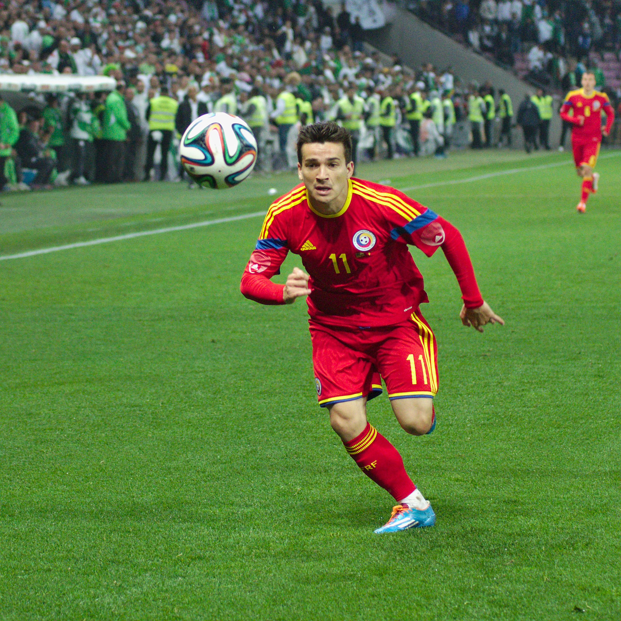 Algérie-Roumanie - 20140604 - Cosmin Matei